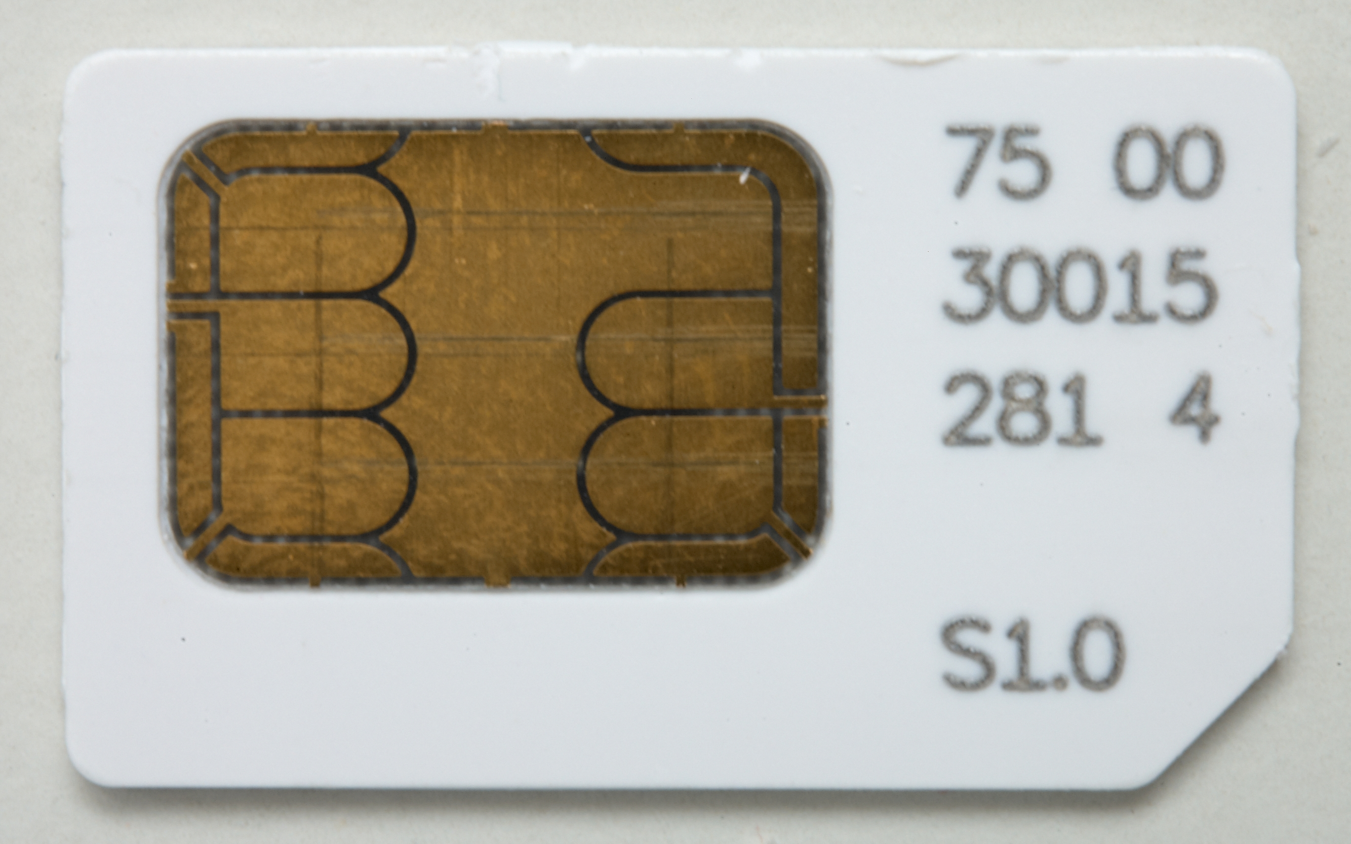 Simkaart van Proximus België. Afmetingen 25 x 15 mm